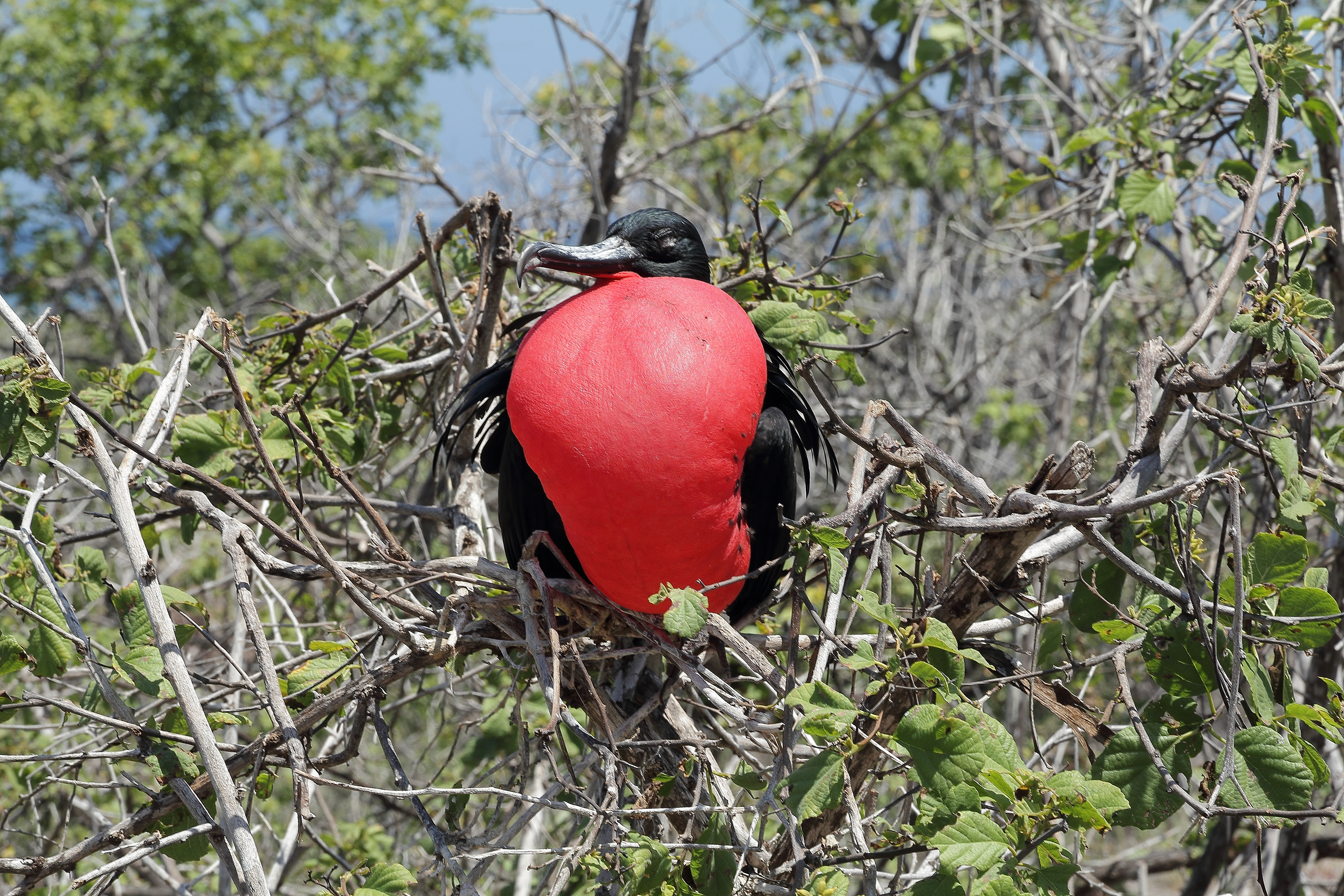 Fregata magnificens på Seymour Norte, Galápagosöarna.